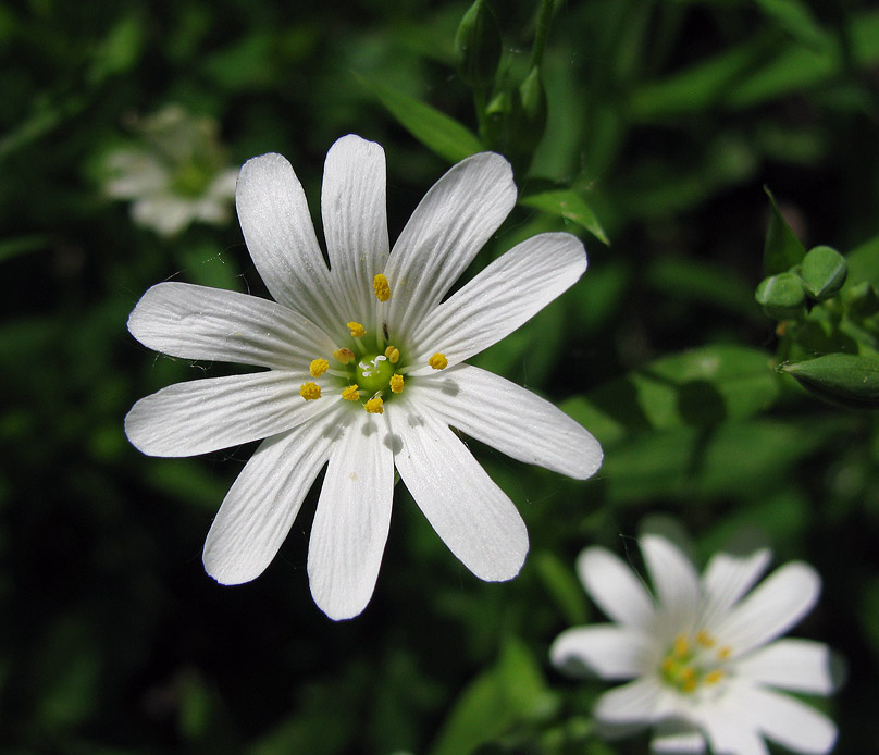 Goloseevo forest, Kiev, Ukraine.